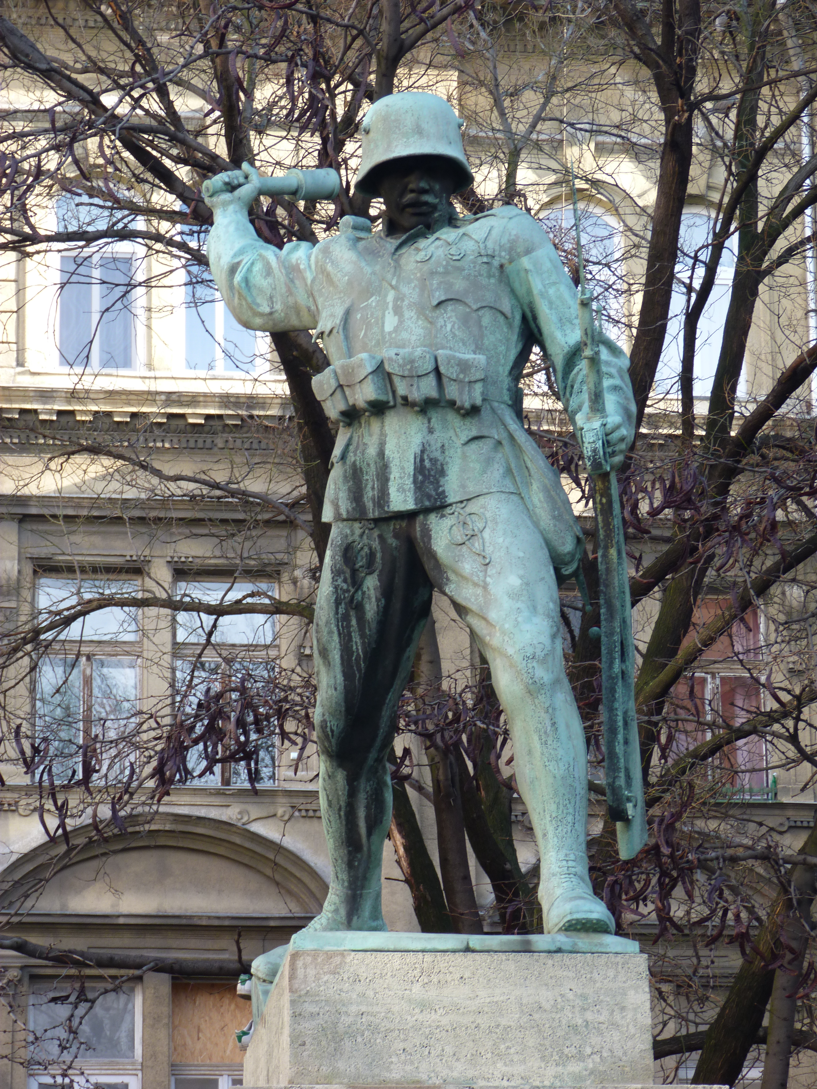 32 –es Mária Terézia Budapesti Háziezred 1741 – 1918 A fekvételek 2012. December 5- én készültek Budapesten, a 32 –esek terén. Vitam et Sanguinem ! Obernberg 1742, Hochkirk 1758, Belgrád 1789, Bassano 1796, Caldiero 1805, Aspern 1809, Leipzig 1813, Novara 1849, Solferino 1859, Skalitz 1866, Stolac 1878, Sabac 1914, Borowa 1914, Tatárszoros 1917, Montello 1918